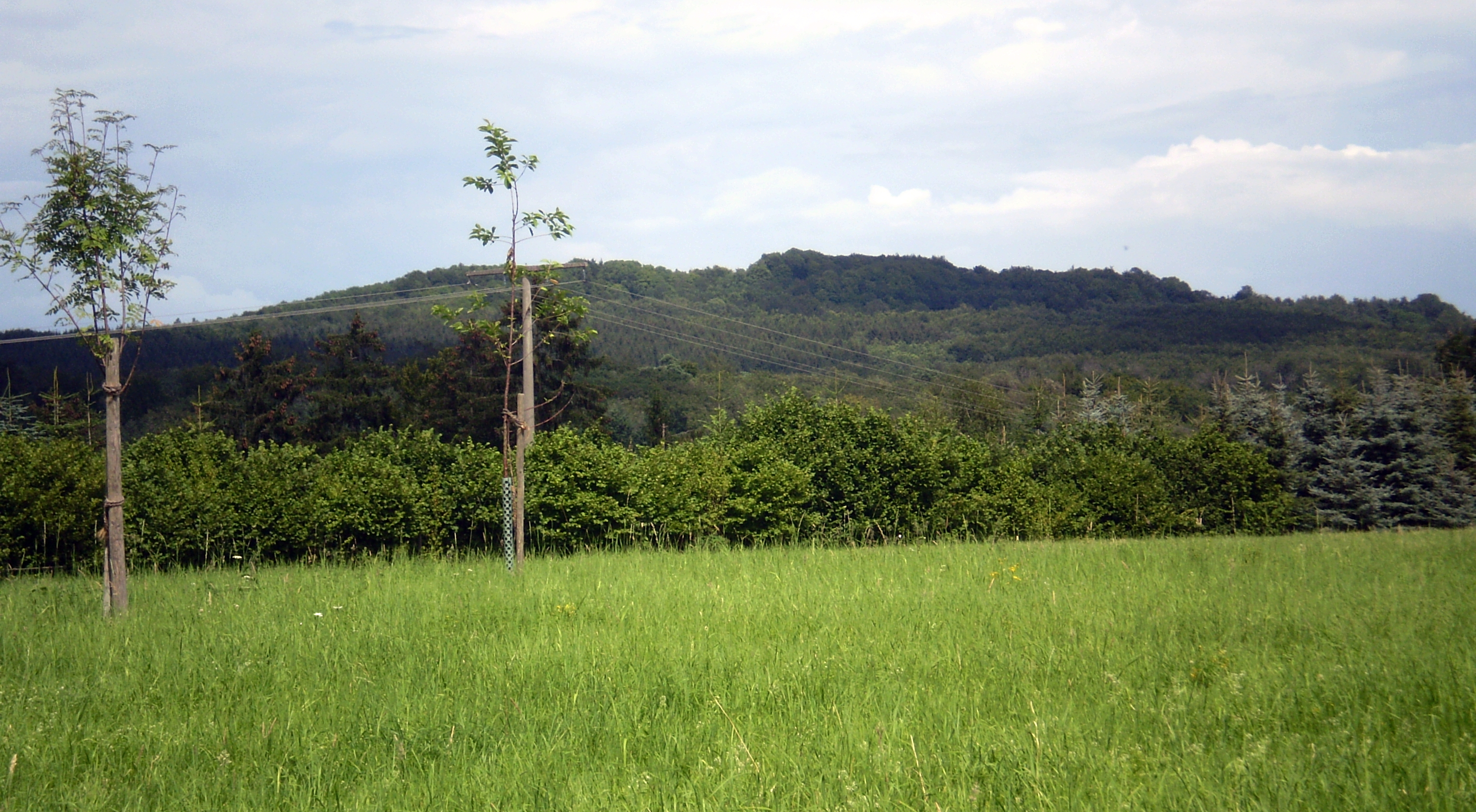 Asberg: Ansicht vom Birkig im Erpeler Kirchspielwald